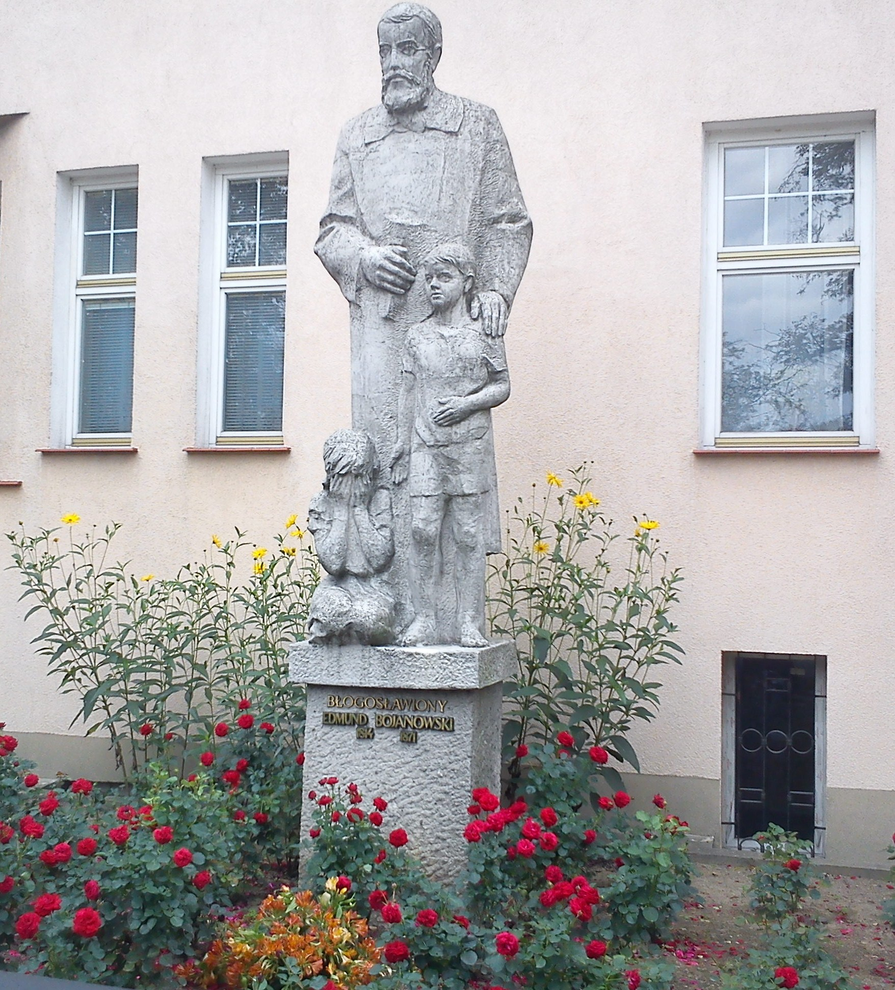 Edmund Bojanowski monument, Luboń-Żabikowo.